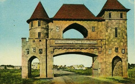 Porte du Souvenir de Trois-Rivières à l'entrée ouest de la cité, 1934.